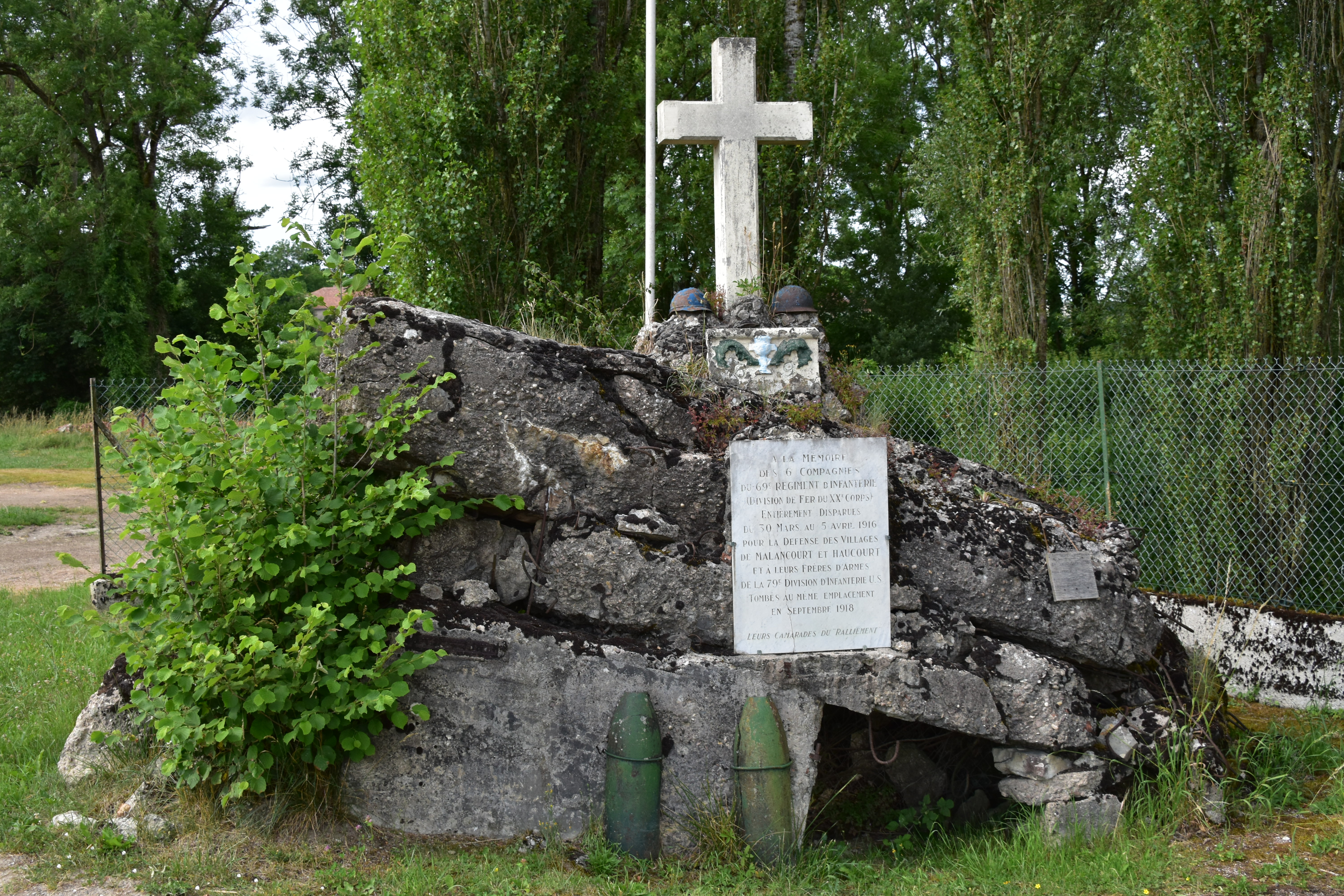 Le mémorial d'Haucourt, village détruit de la première guerre mondiale, composé d'un ancien blockaus américain.